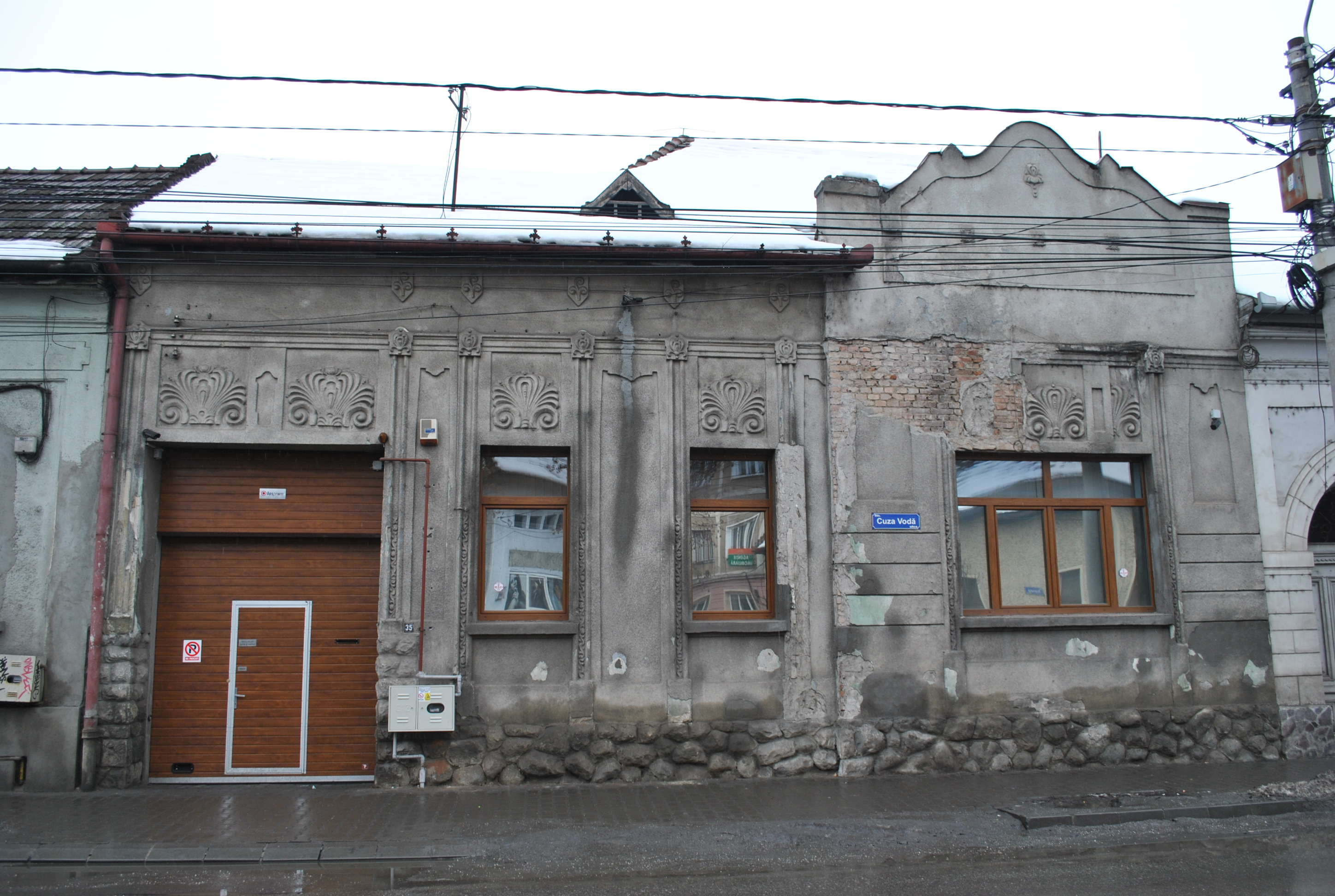 Casă (Vila Csonka), 1910 - 1911